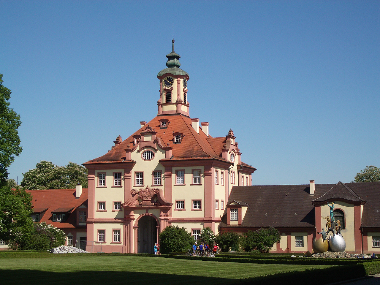 Altshausen, Germany: Schloss, Torgebäude, vom Schlosshof